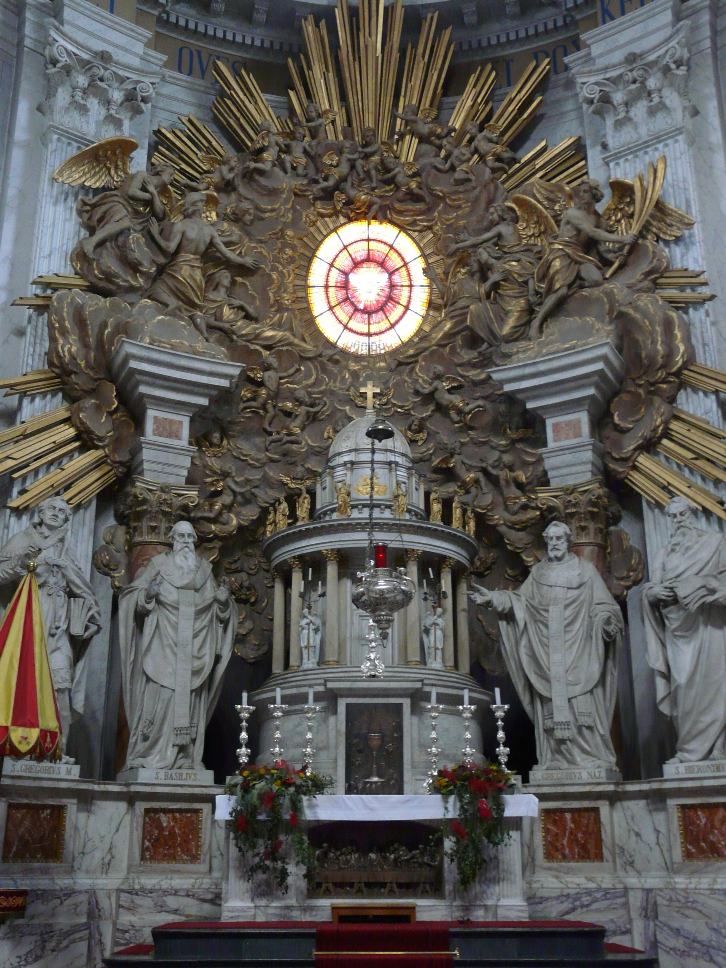 Interieur Basiliek